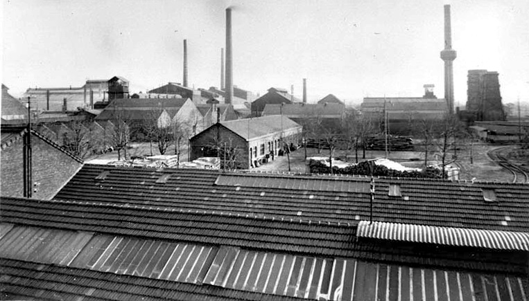 Overzicht van de zinkwitfabriek van de Maastrichtsche Zinkwit Maatschappij in Eijsden, Limburg, in 1925. Fotocollectie RHCL Maastricht, GAM 33397.